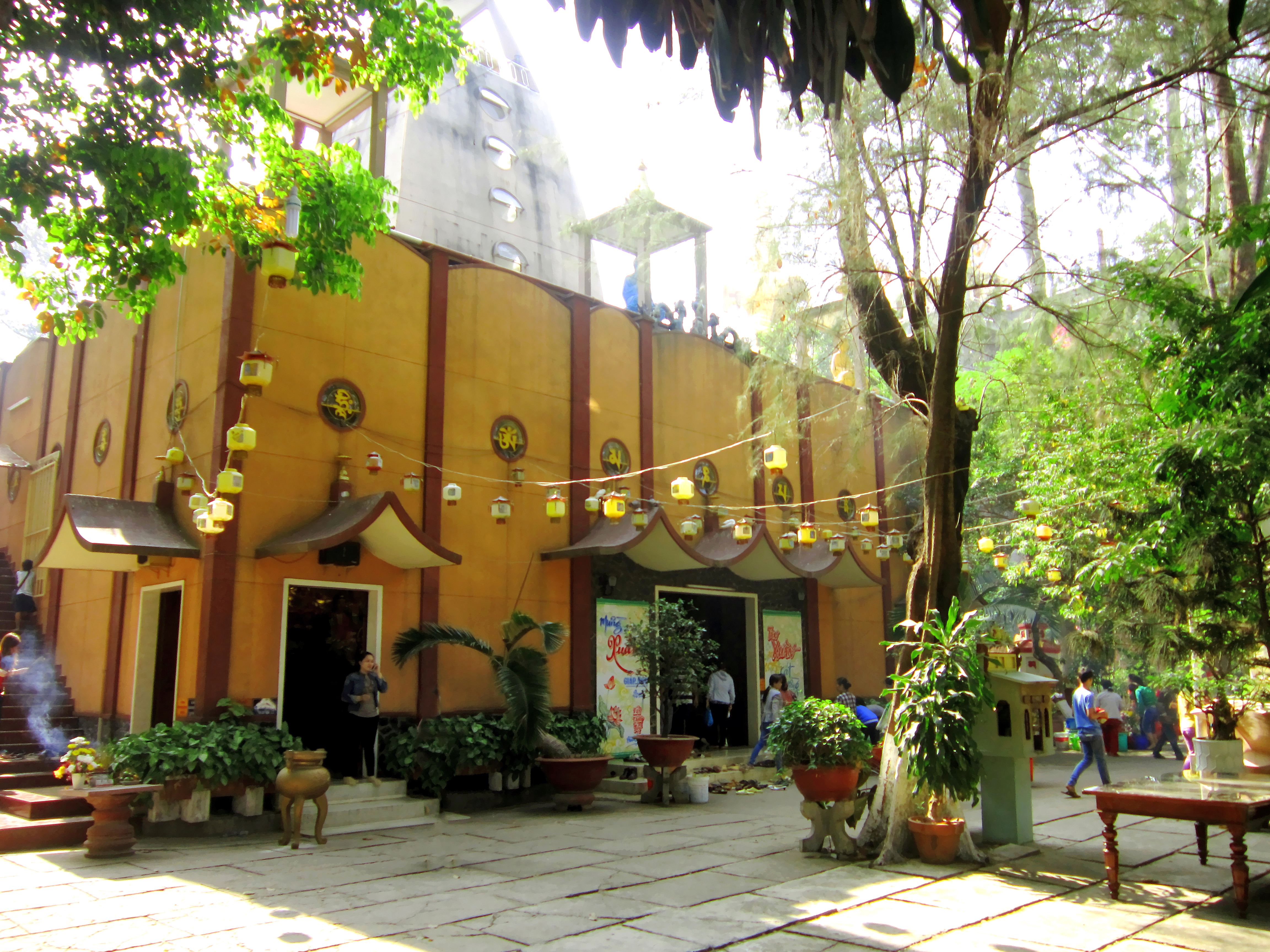 Chùa Tây Tạng là một ngôi chùa Việt Nam, tọa lạc tại 46B Thích Quảng Đức, phường Chánh Nghĩa, thành phố Thủ Dầu Một, tỉnh Bình Dương.